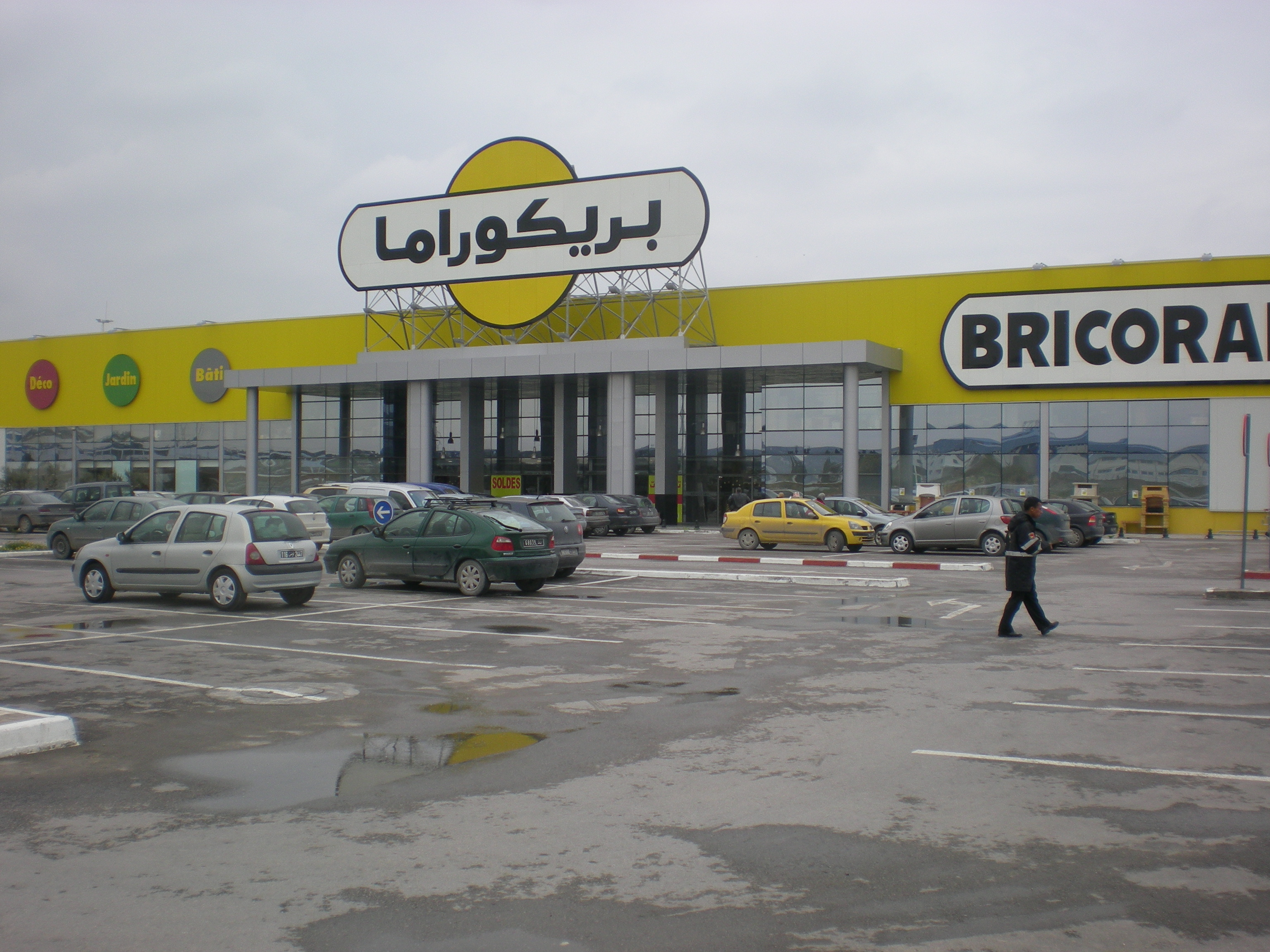 Le magasin Bricorama dans la banlieue nord de Tunis